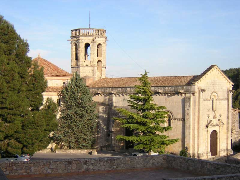 Esglèsia de Sta. Maria de Sant Marti de Sarroca (Barcelona, Spain). 07/05/05